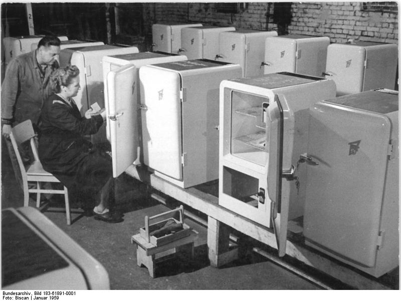 Zentralbild-Biscan 29.1.1959 1.200 Kühlschränke aus dem Schwermaschinenbau "Ernst Thälmann"; Der V. Parteitag der SED hatte auch den Schwermaschinenbauern die Aufgabe gestellt, in einem wesentlich schnelleren Tempo als bisher die Produktion von industriellen Kosumgütern zu steigern. Der Schwermaschinenbau "Ernst Thälmann"in Magdeburg hat im vorigen Jahr für rund 3 Millionen DM industrielle Kosumgüter hergestellt. Unter anderem wurde der Haushaltskühlschrank "Absorber" harausgebracht, der sehr leistungsstark und formschön ist und bei den Hausfrauen begeisterte Aufnahme gefunden hat. Der "Absorber" hat 45 Liter Inhalt, hat 4 bis 6 Grad Innentemüperatur bei 20 bis 25 Grad Aussentemperatur und verbraucht täglich zwei Kilowattstunden. UBz.: Schlosser Josef Stiebitz und Erika Bierotte bei der Abnahme eines fertig monteirten Schrankes.